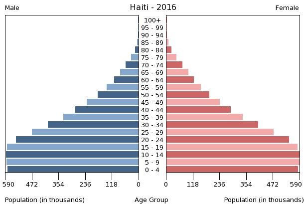 A population pyramid illustrates the age and sex structure of a country's population and may provide insights about political and social stability, as well as economic development. The population is distributed along the horizontal axis, with males shown on the left and females on the right. The male and female populations are broken down into 5-year age groups represented as horizontal bars along the vertical axis, with the youngest age groups at the bottom and the oldest at the top. The shape of the population pyramid gradually evolves over time based on fertility, mortality, and international migration trends.